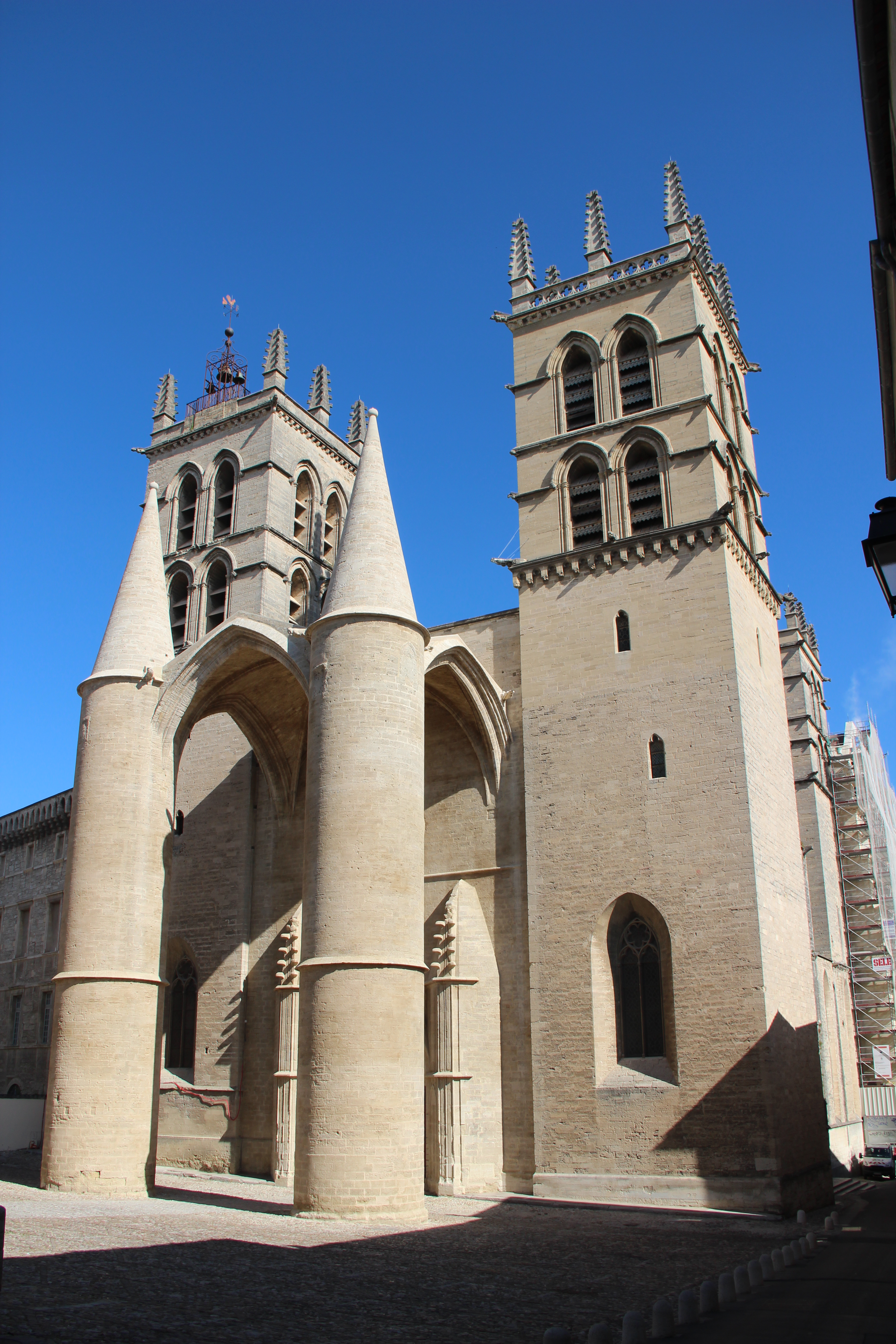 Cathédrale Saint-Pierre